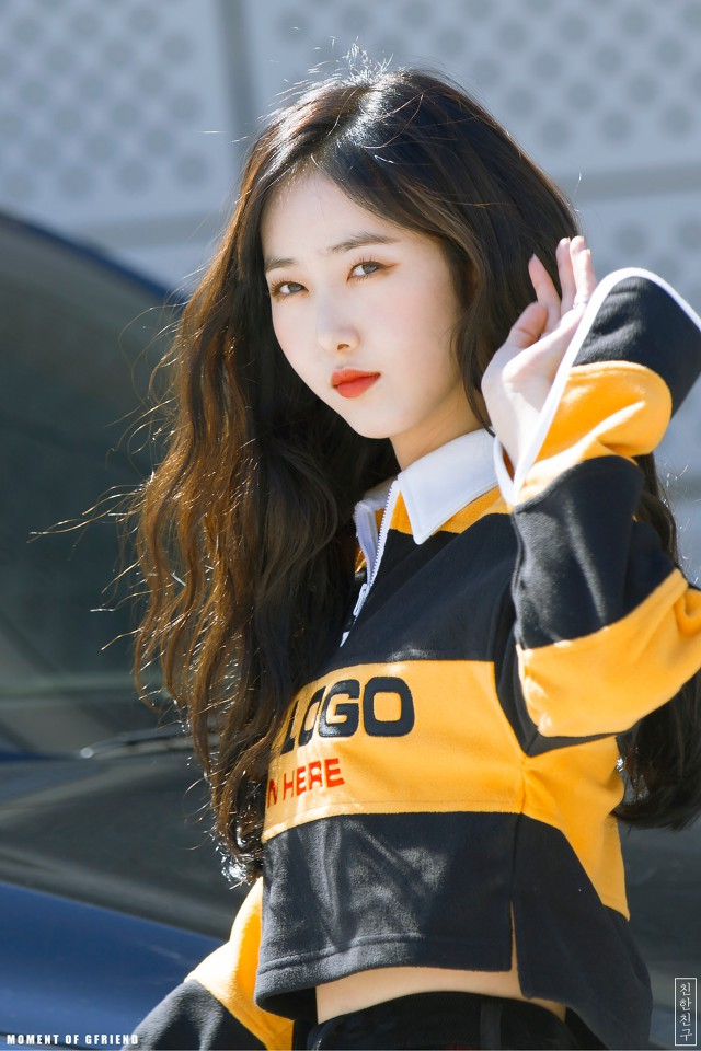 181019 서울 패션 위크